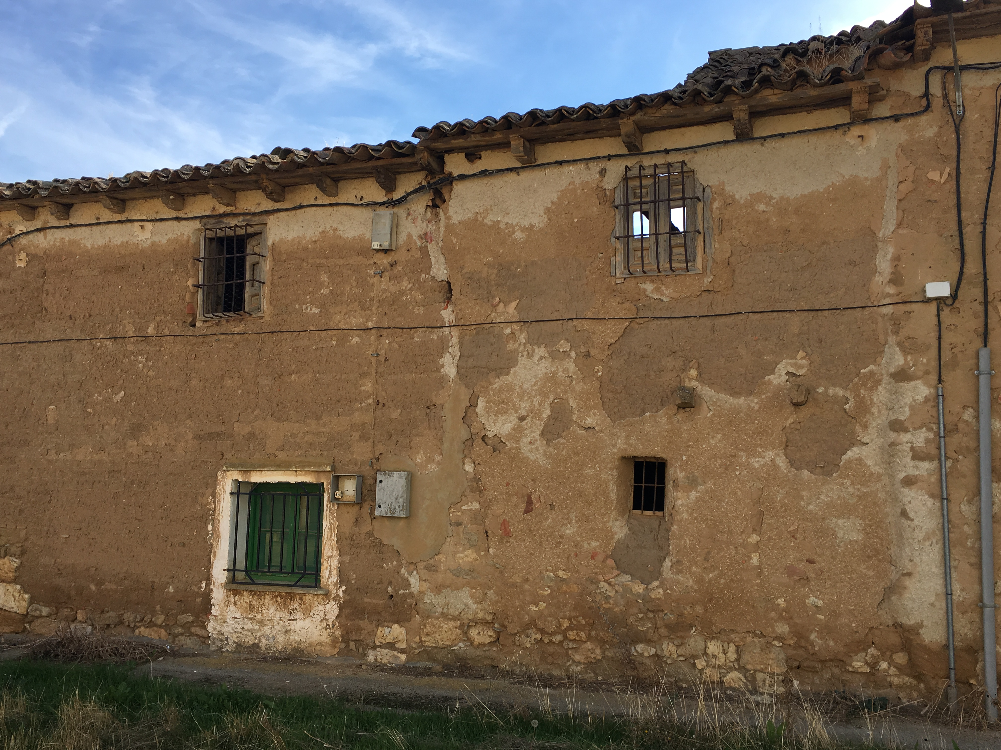 Villaesper Milenario